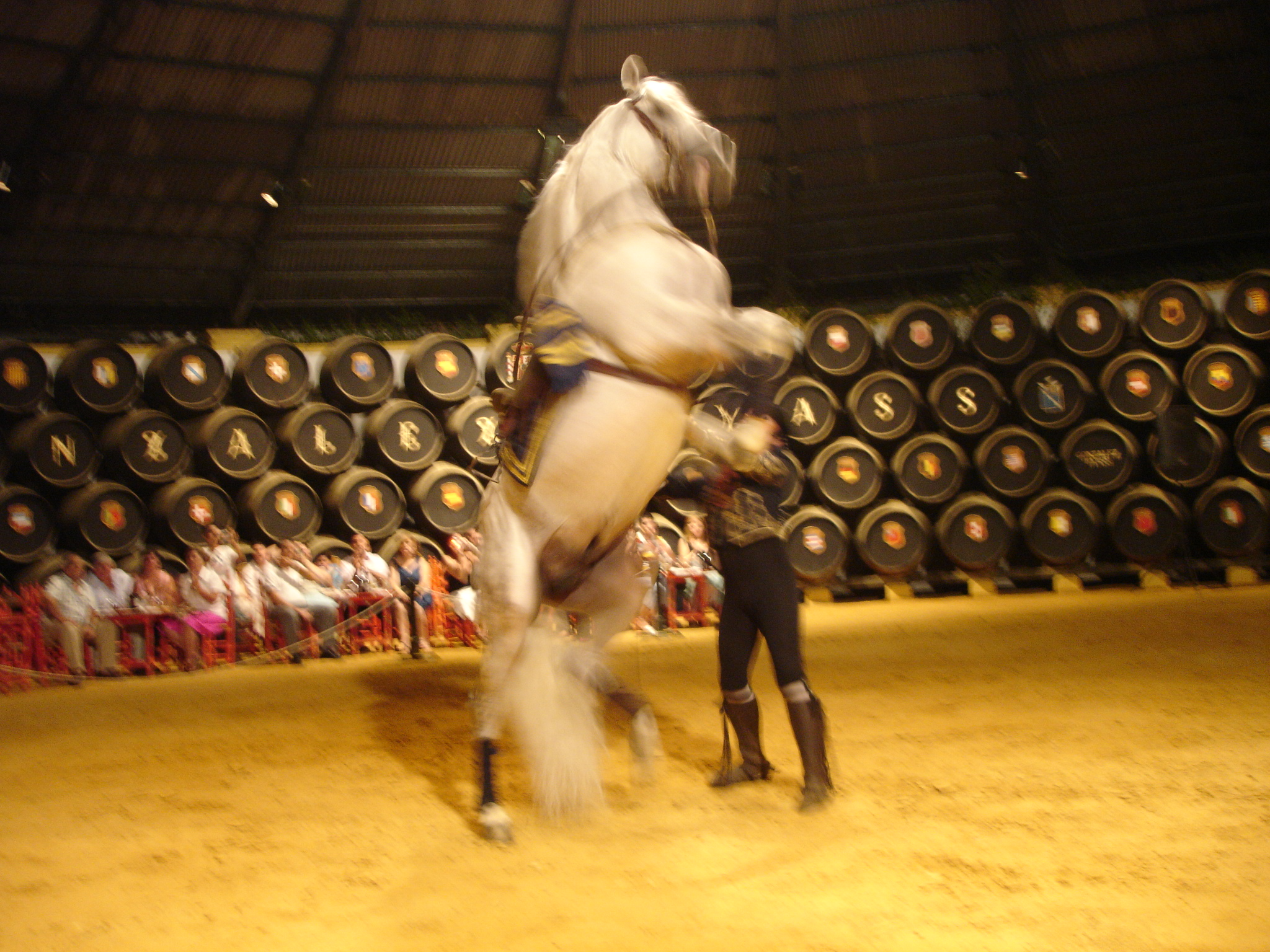 Espectáculo de flamenco y doma en las Bodegas Tío Pepe de Jerez de la Frontera. Andalusia (Spain)